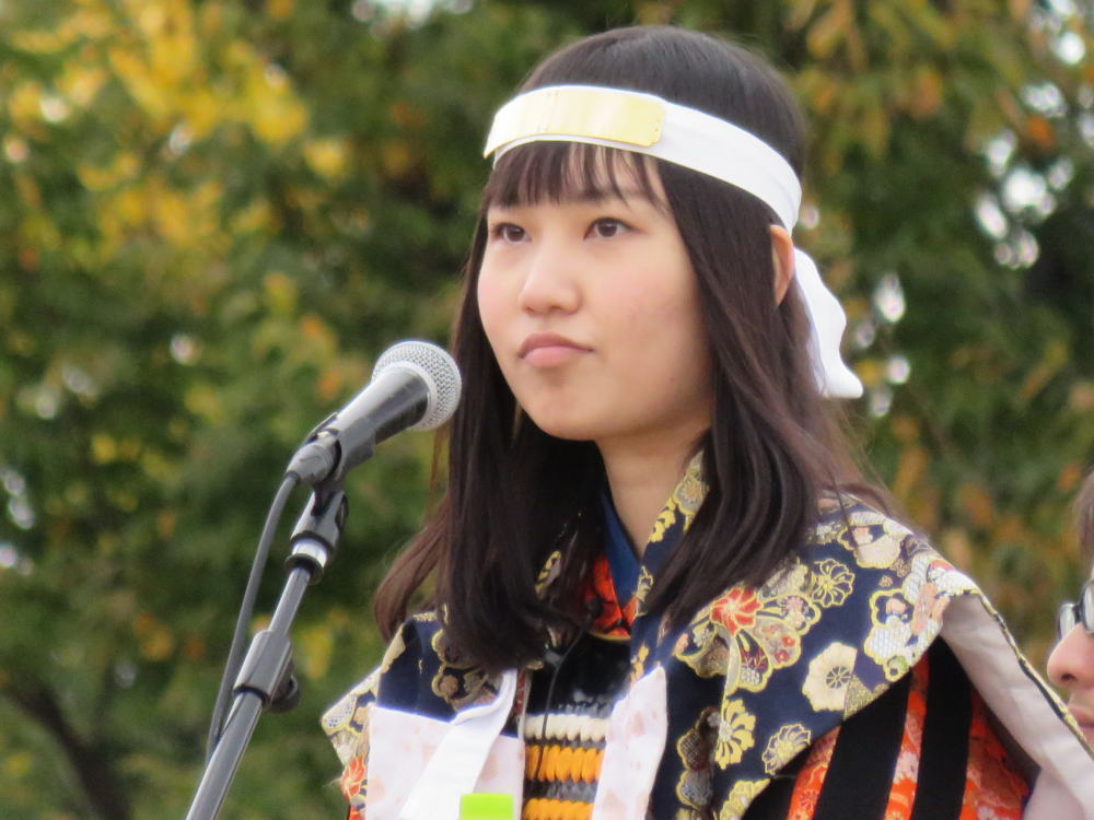 将棋棋士の長谷川優貴（平成27年11月28日、姫路市で行われた人間将棋にて）